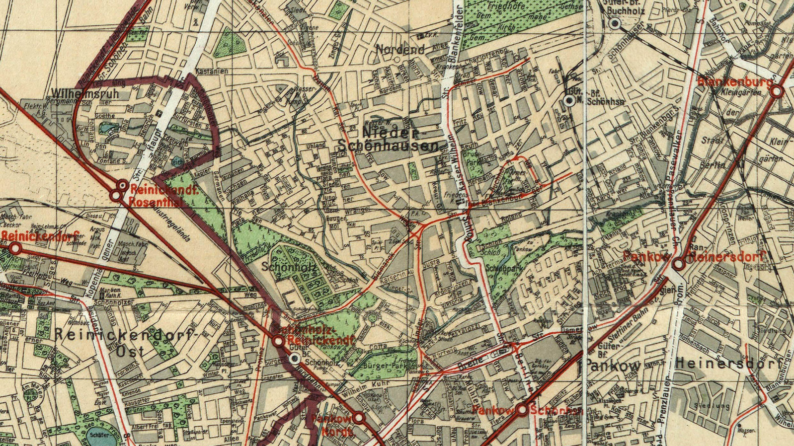 Die Straßen von Berlin-Niederschönhausen auf dem Silva-Übersichtsplan von der Stadt Berlin und ihren 20 Verwaltungsbezirken : auf Grund des Gesetzes vom 27. April 1920 / bearb. und hrsg. von Willy Holz * Format: ca 163 x 117 cm * Orientierung: Nord * Maßstab: 1: 30 000 (Innenstadt 1: 20 000) * 2 Blätter, mehrfarbig